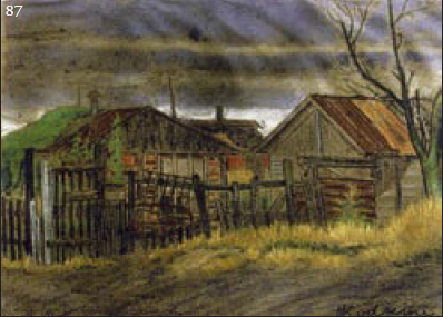 Картина "В деревне"